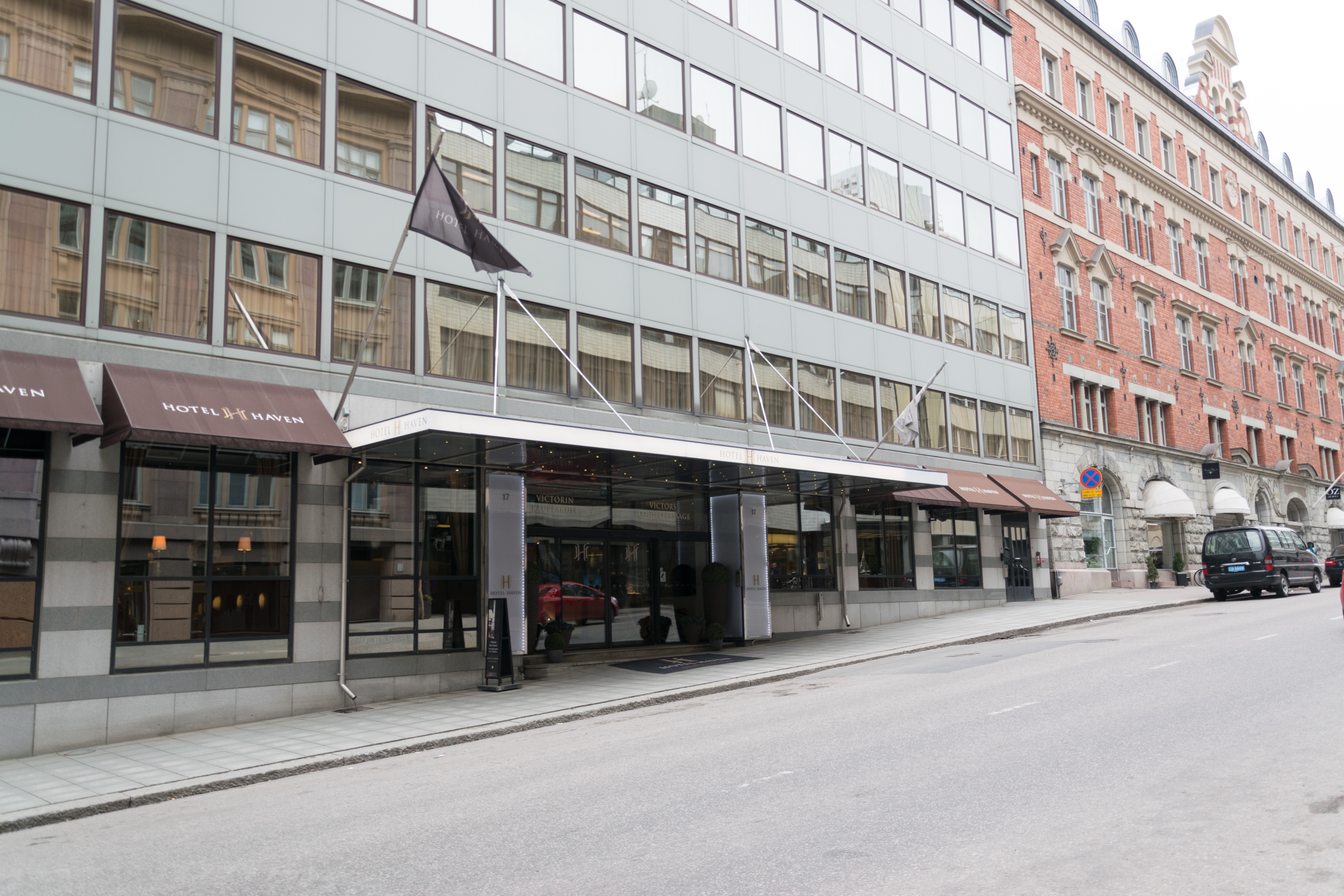 Hotel haven helsingissä